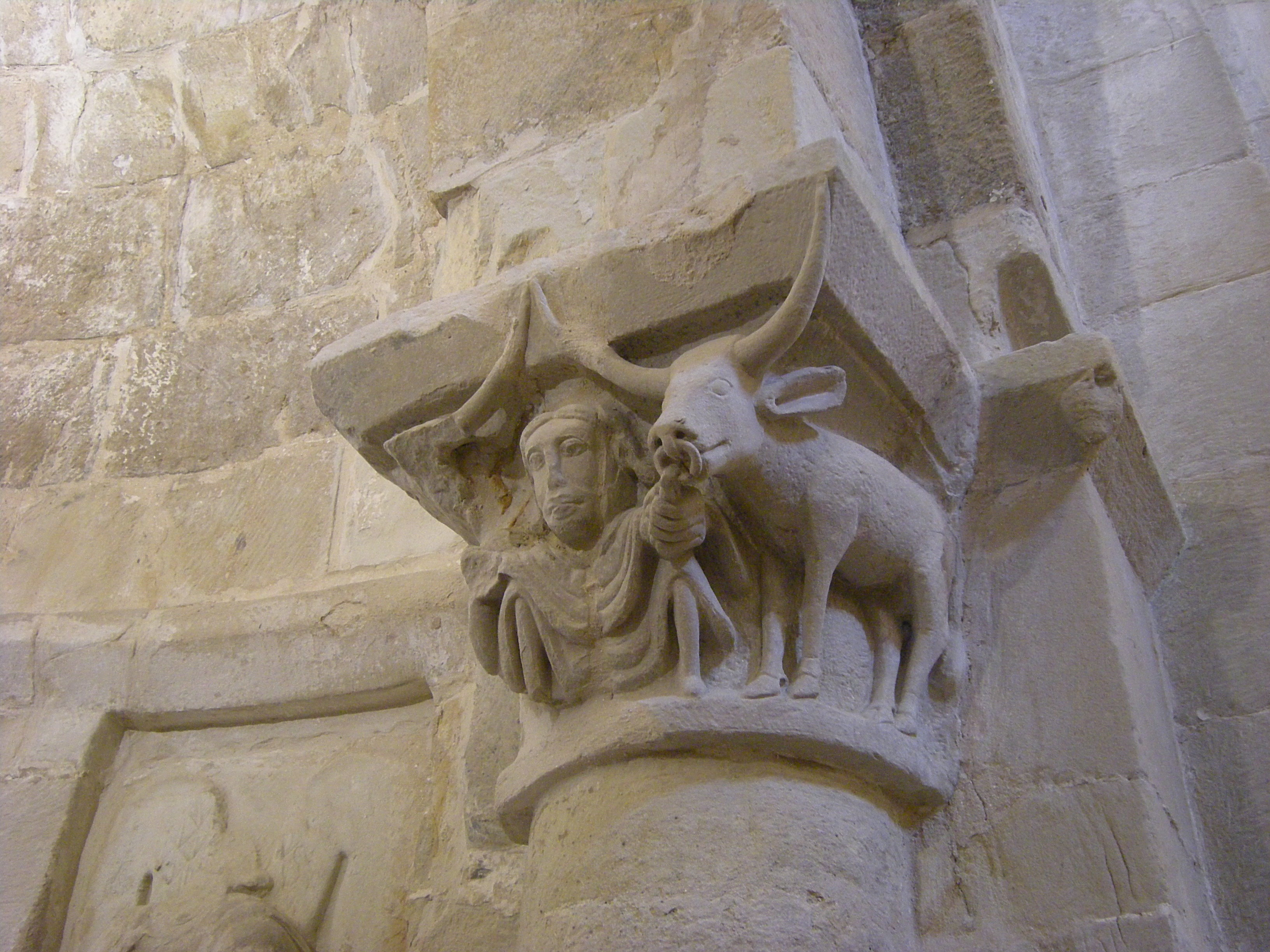 Detalle de un capitel de la iglesia de Santa María de Bareyo.